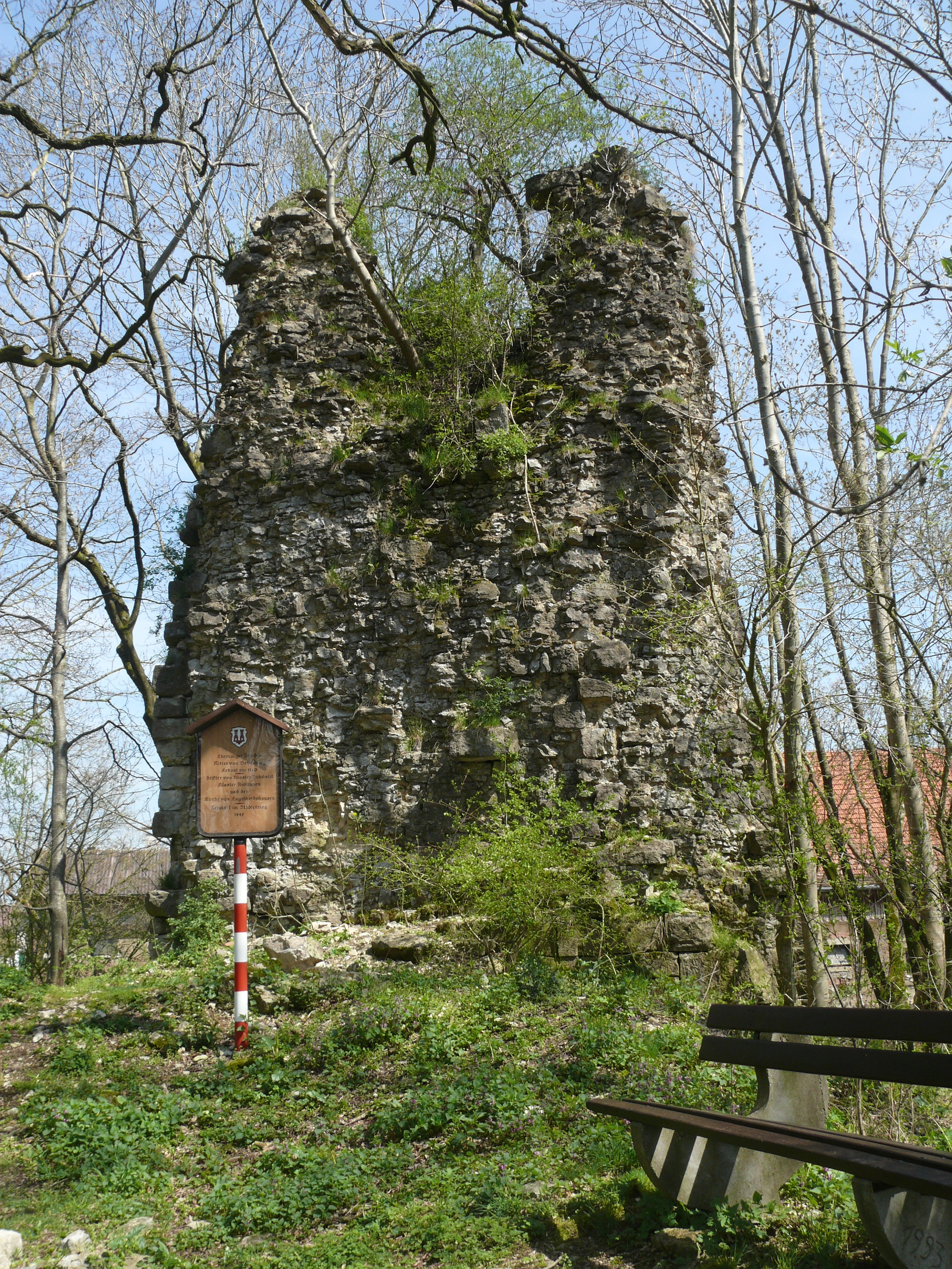 Ruine Bebenburg, Rot am See, Deutschland